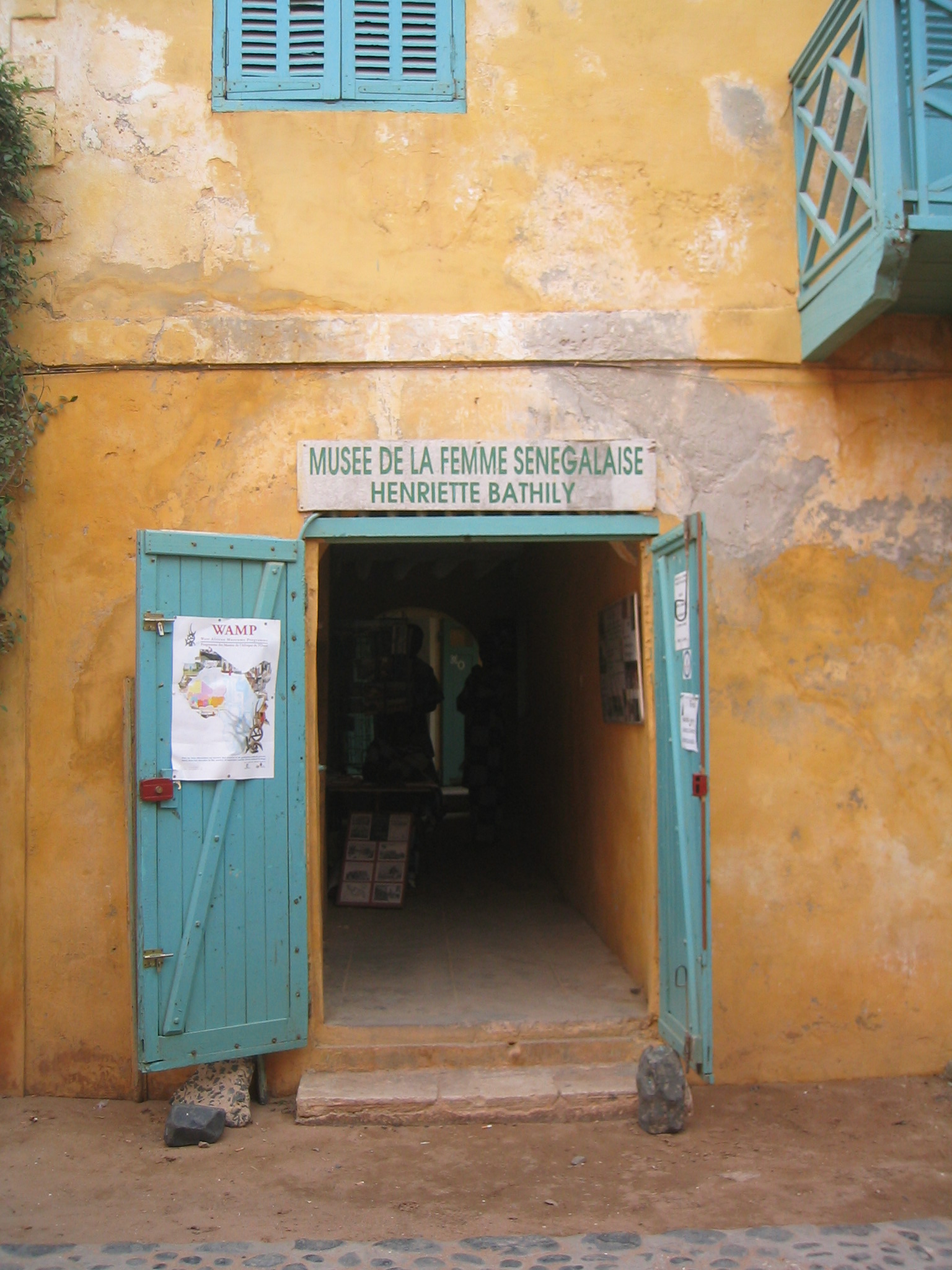 Musée de la femme sénégalaise Henriette Bathily à l'île de Gorée (Sénégal)